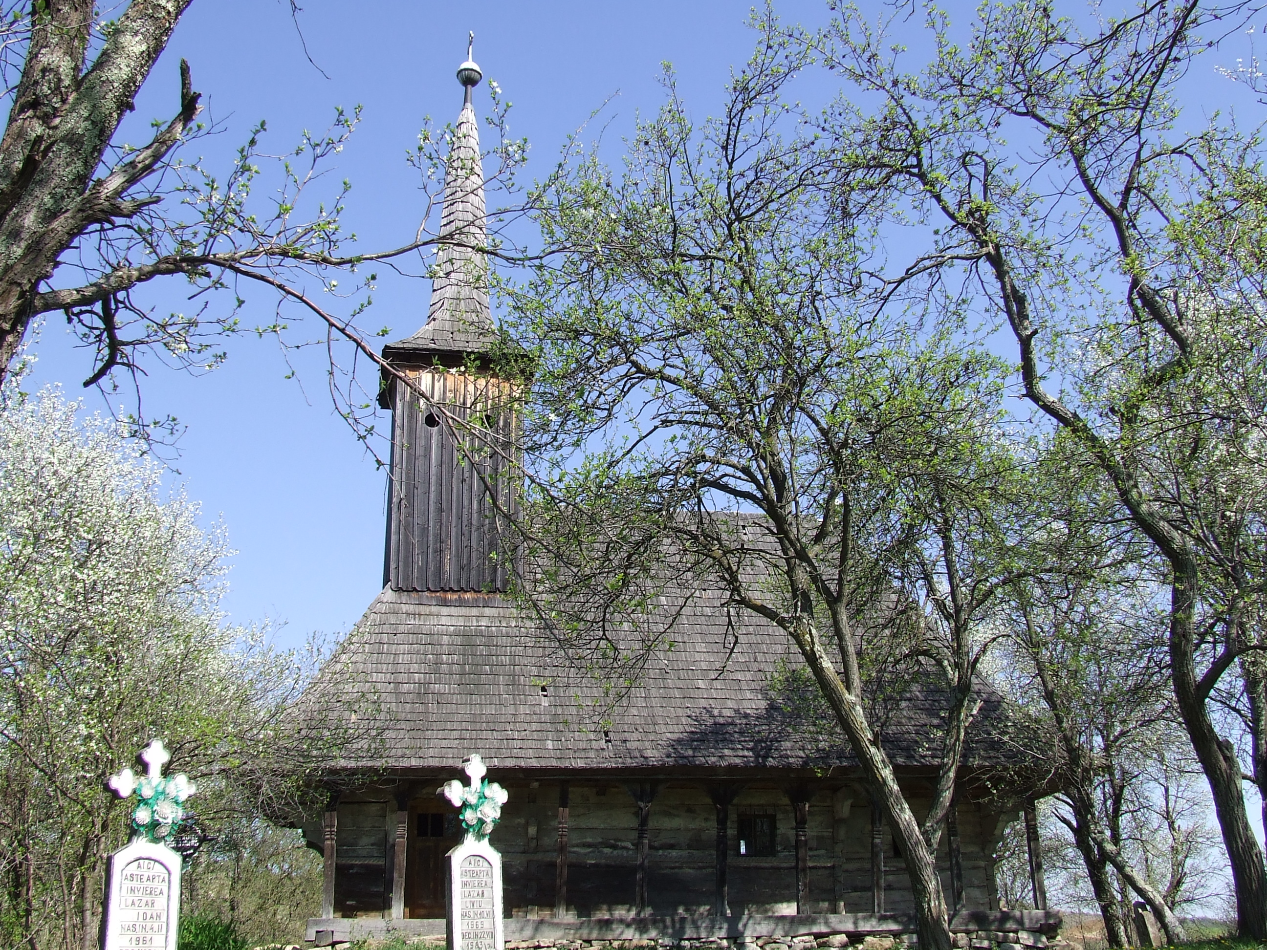 Biserica de lemn din Bozna